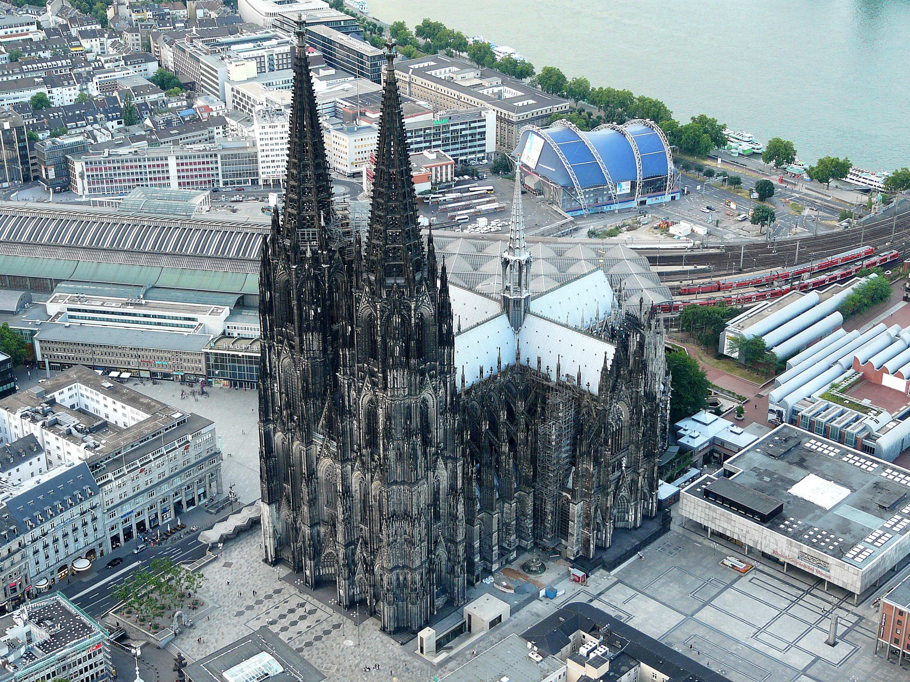 Kölner Dom, Römisch-Germanisches Museum und Domplatte.